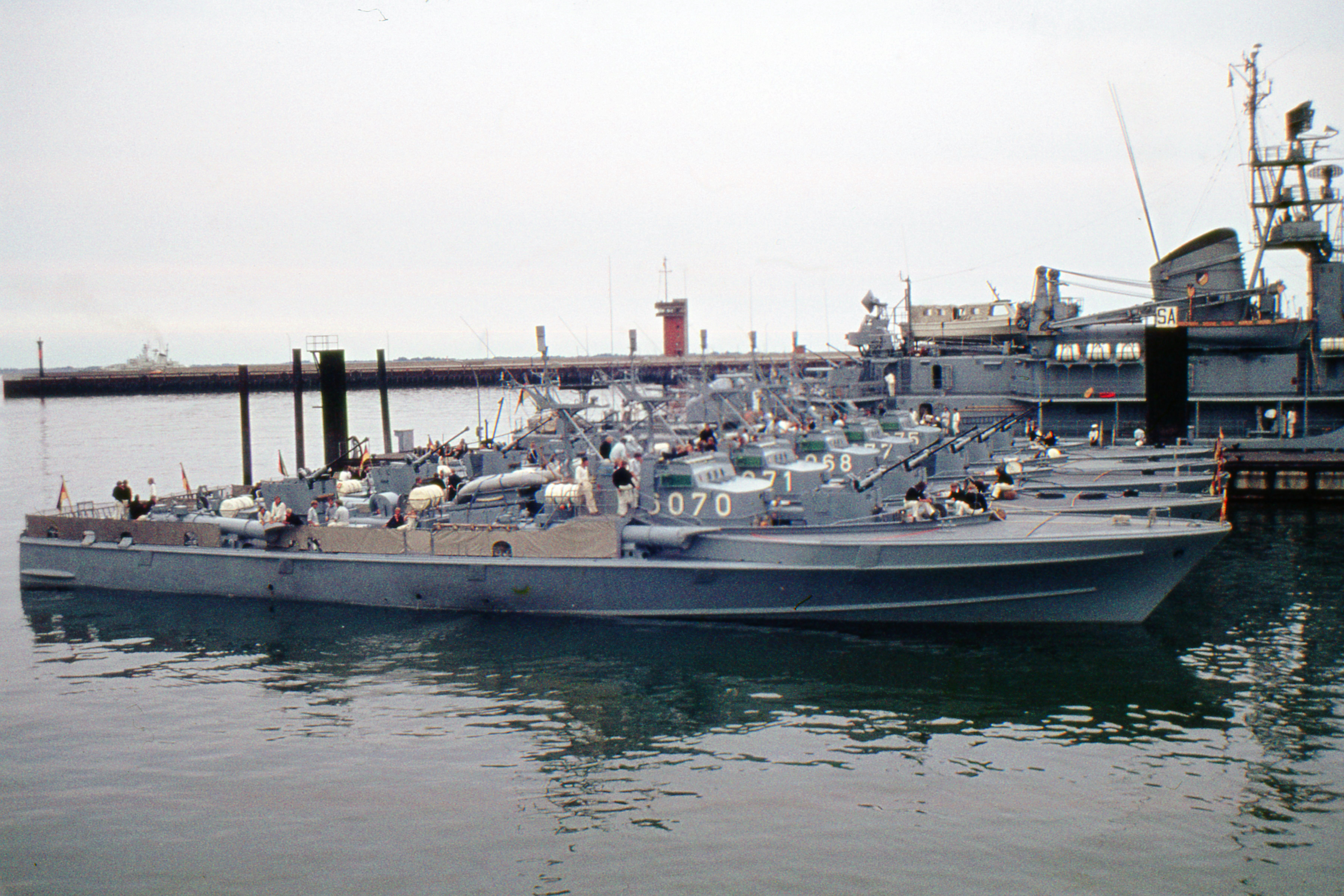 Fünf Schnellboote der Klasse 141 (Seeadler-Klasse): Kondor, Greif, Seeadler, Komoran und Habicht (von vorn nach hinten). Dahinter Tender „Elbe“. Alle Einheiten gehören zum 2. Schnellbootgeschwader.